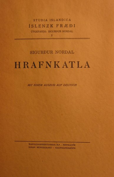 Couverture de Hrafnkatla, oeuvre critique de Sigurdur Nordal sur la saga de Hrafnkell (1940).